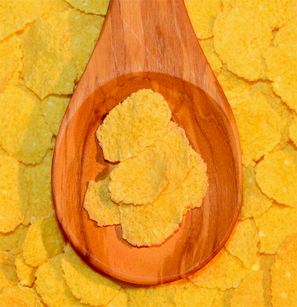 Quinoa-cornflakes